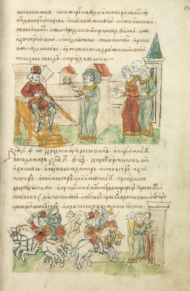 Радзивилловская (Кёнигсбергская) летопись.